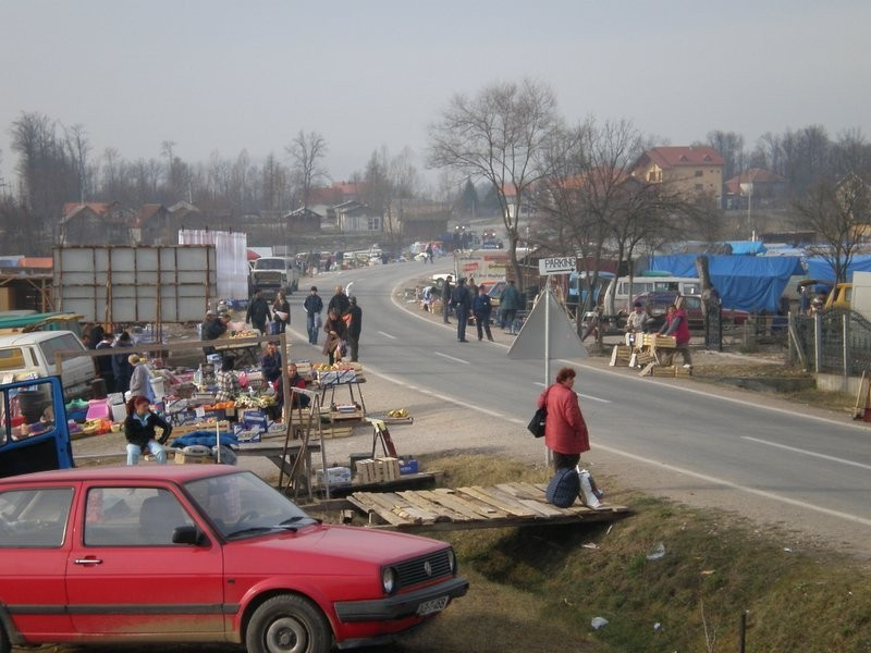 Moja fotografija